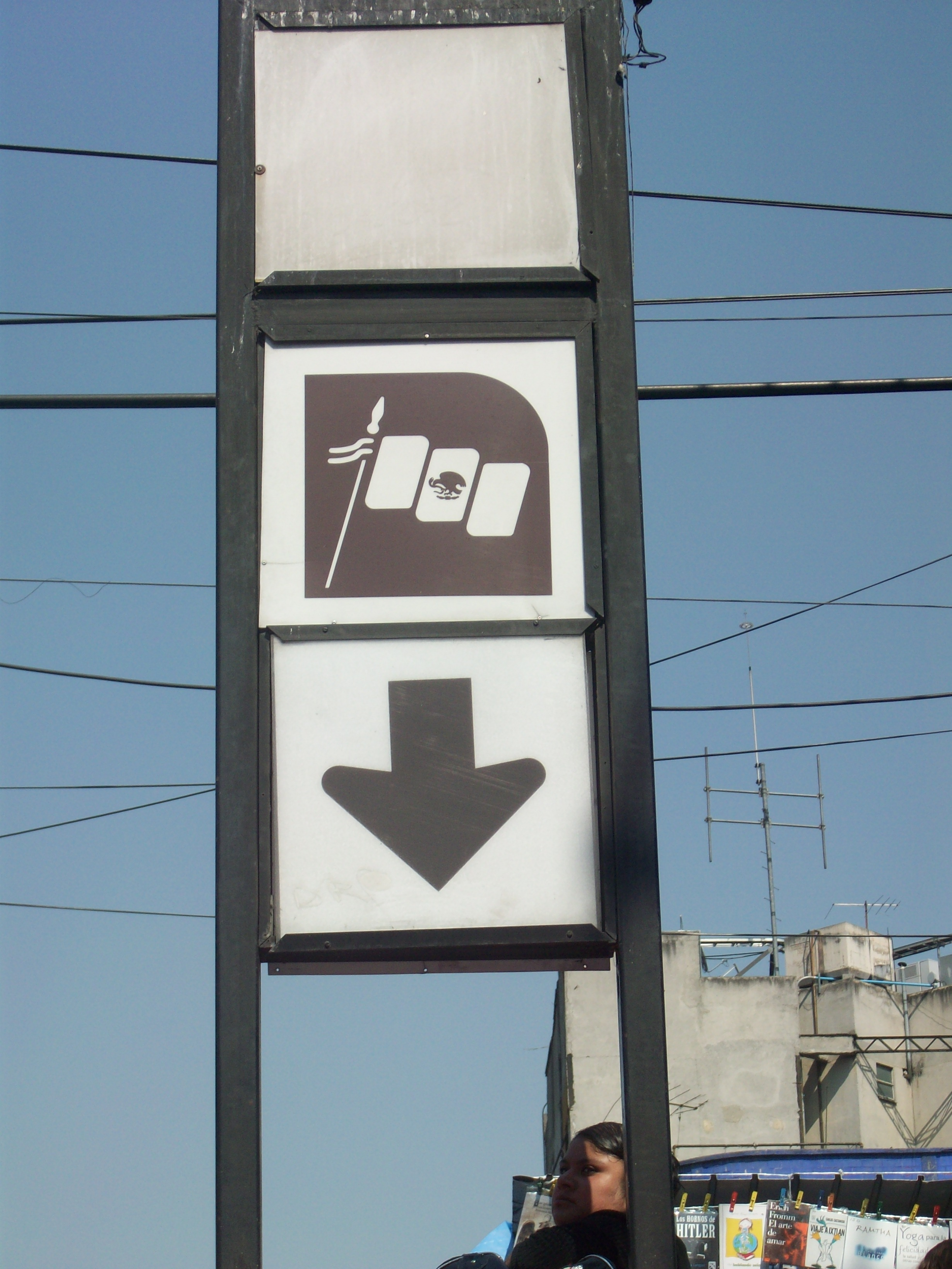 Estela estacion patriotismo